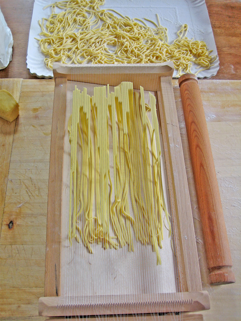 Les spaghetti alla chitarra, dits aussi tonnarelli ou maccheroni alla chitarra (du dialecte maccarunə) dans les Abruzzes, sont une variété de pâte aux œufs, typique de la cuisine italienne abruzzese